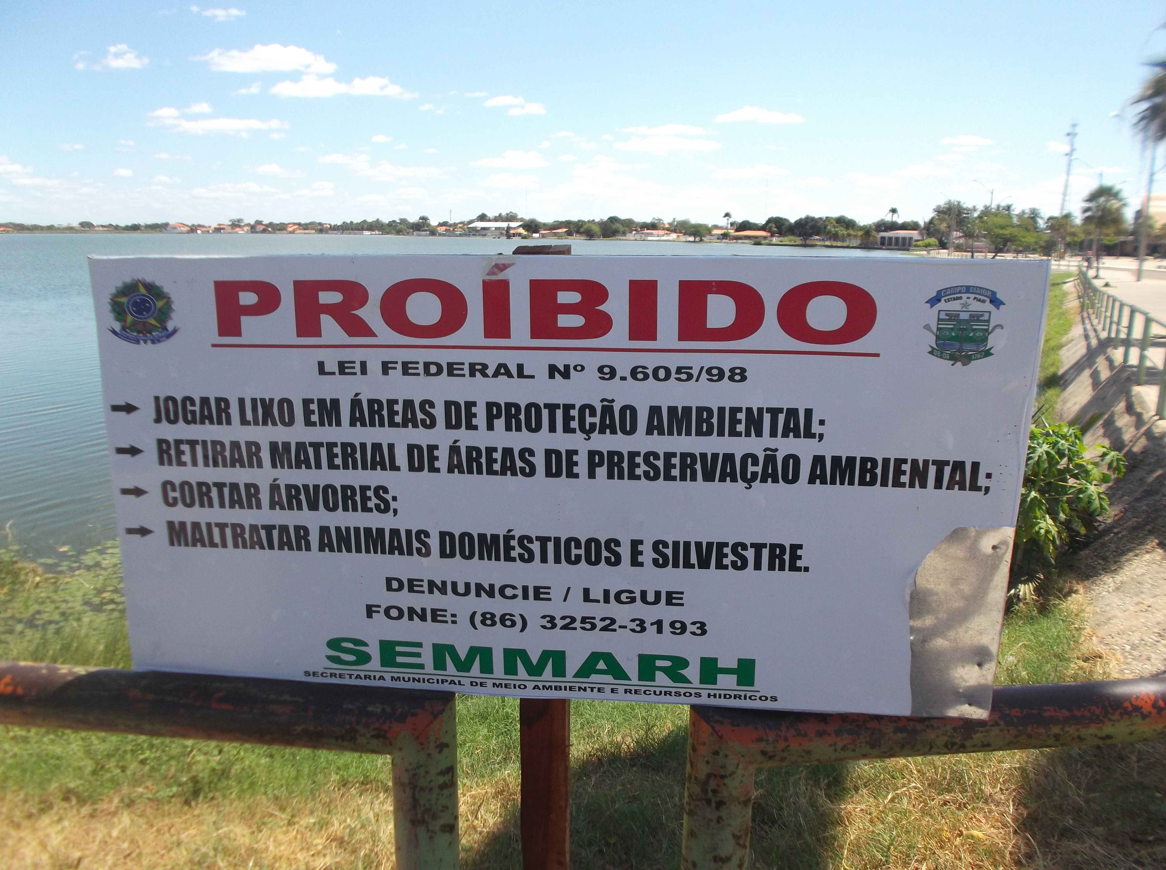 Placa de conscientização ambiental com mensagem da Lei brasileira nº 9605/1998.